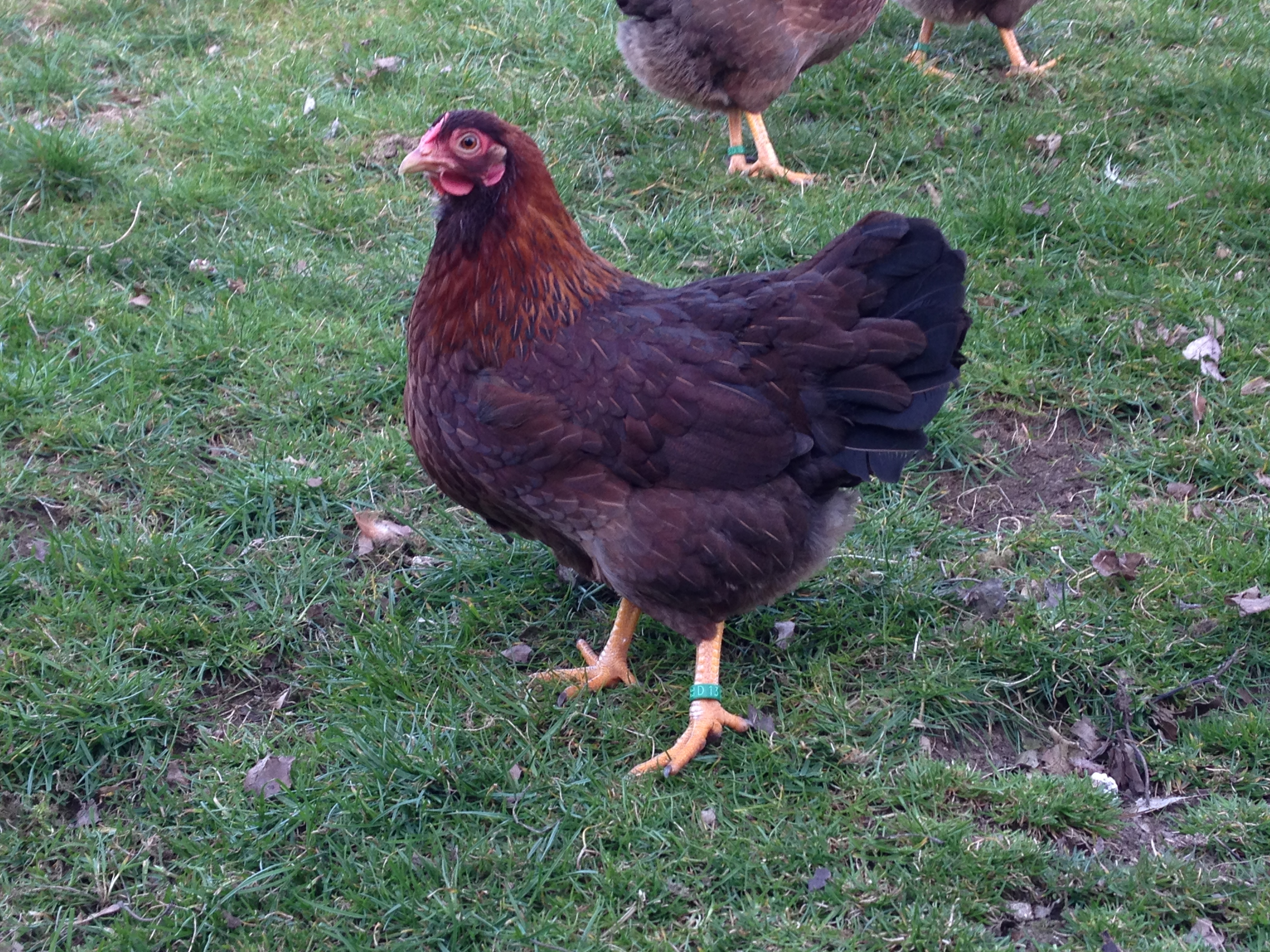 Zwerg-Dresdner Henne im Farbschlag rost-rebhuhnfarbig